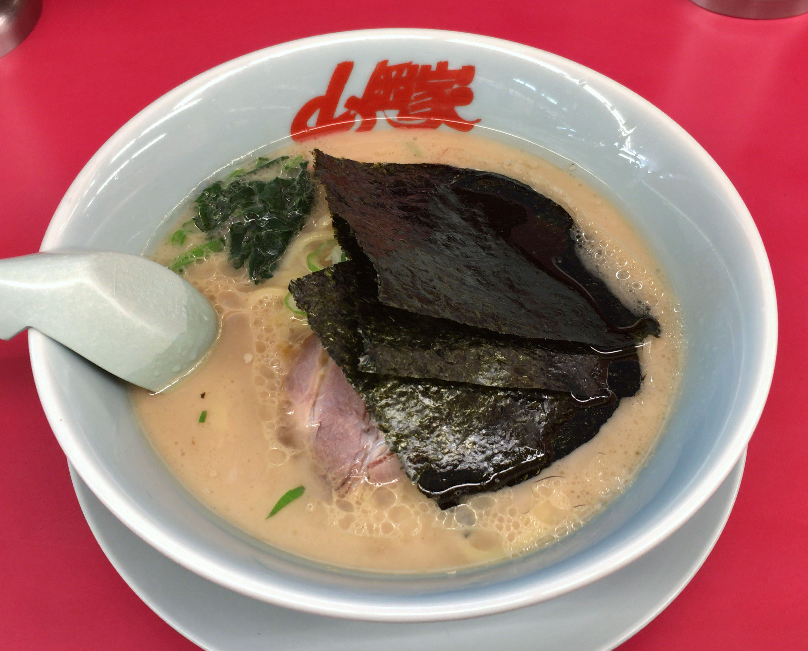 山岡家の醤油ラーメン（濁ってますが醤油です）